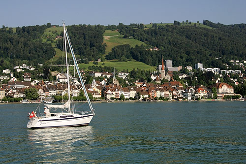 Die Altstadt von Zug und Zugerberg vom See her gesehen